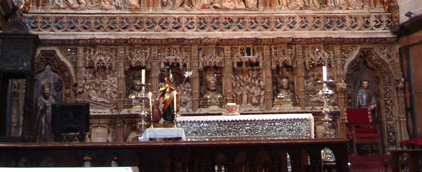 Bancal del retaule de la catedral de Saragossa (Pere Joan)